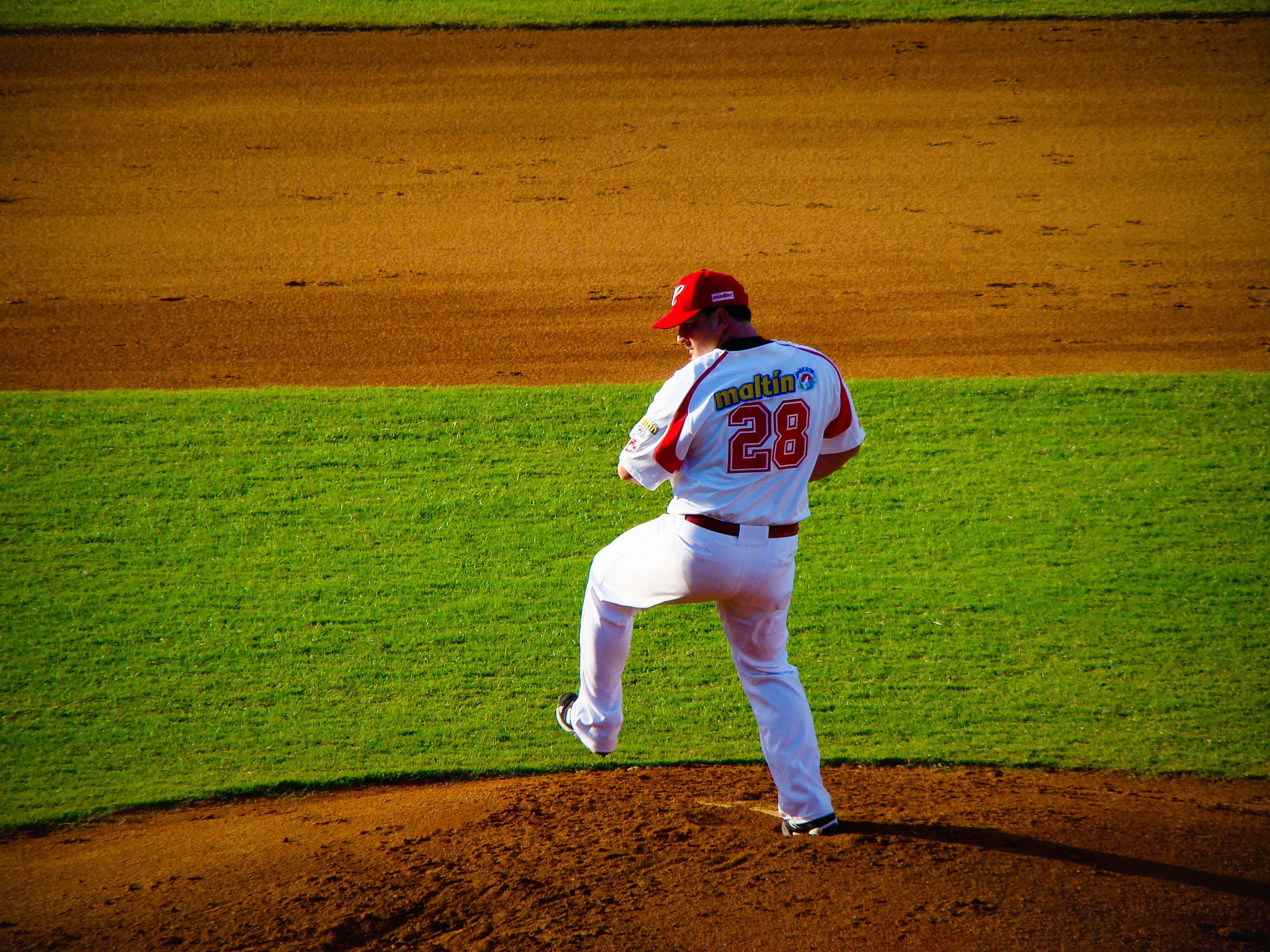 EXPRESIÓN DEL FANATISMO, FUERZA Y GLORIA DEL BEISBOL VENEZOLANO. EN LA IMAGEN SE DEMUESTRA EL ESTILO, PRECISIÓN Y PASIÓN CON LA QUE LOS JUGADORES PRACTICAN ESTE DEPORTE. EL EQUIPO DE LOS CARDENALES DE LARA ES QUIEN TIENE LA ACCIÓN EN ESTA MUESTRA.